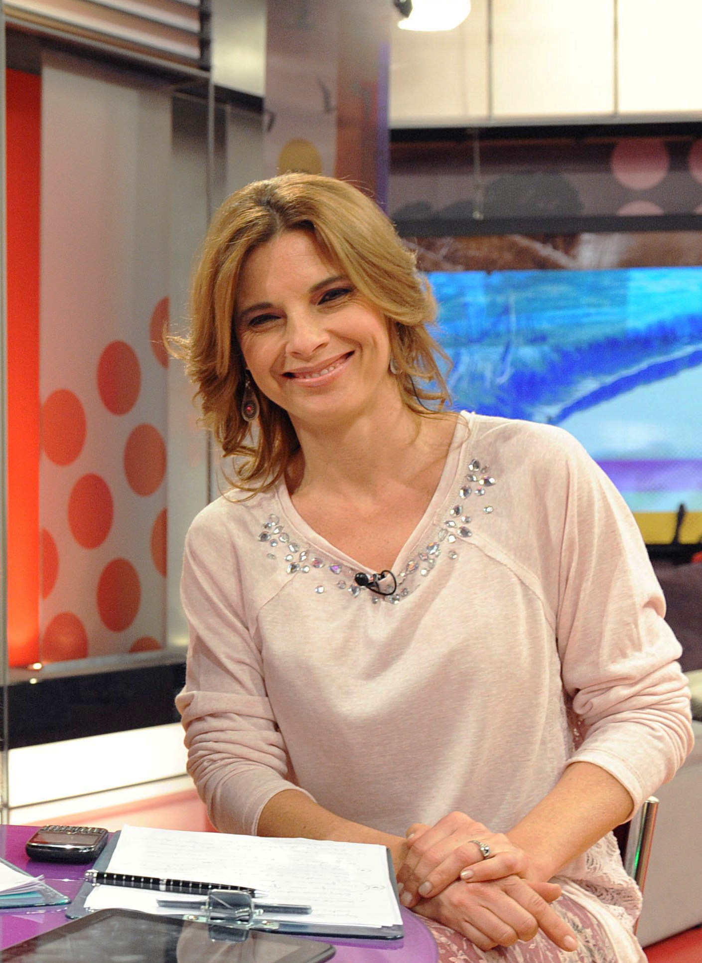 Mariana Carbajal en el programa de televisión Vivo en Argentina.